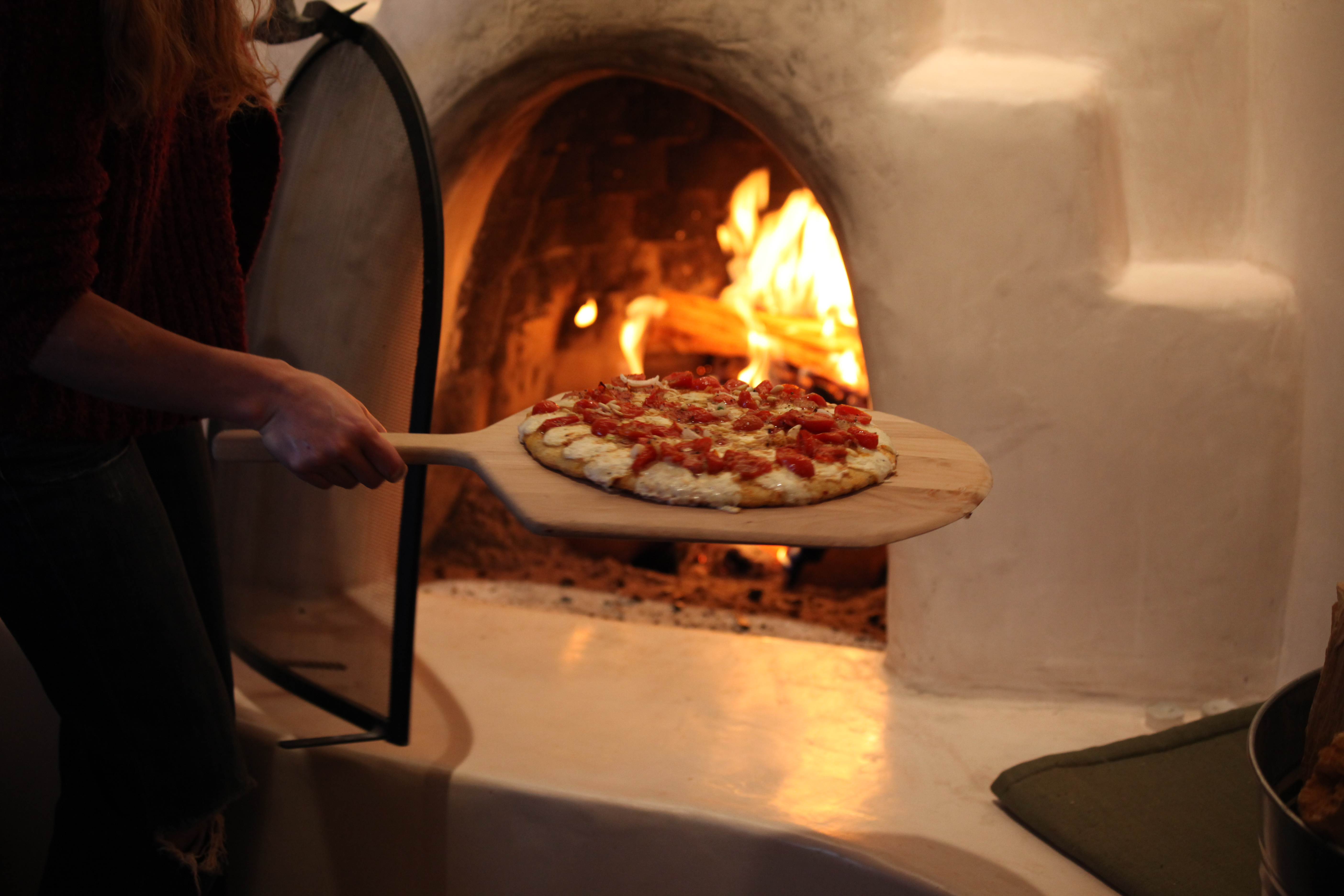 pizza!